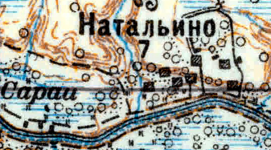 Топографическая карта Ленинградской области, квадрат VIc (Красные Горы), деревня Натальино